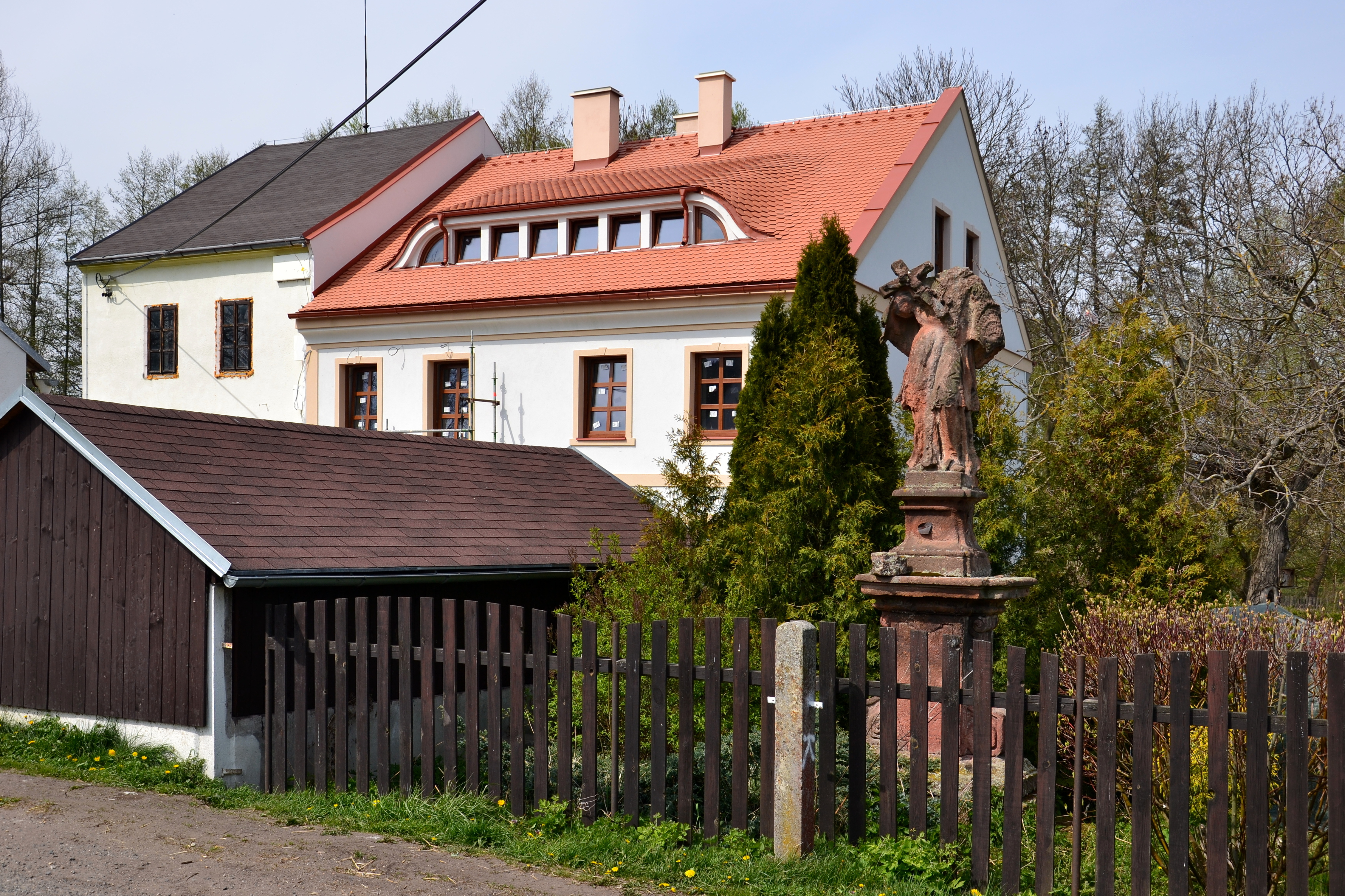 Vojnín – dům čp. 7